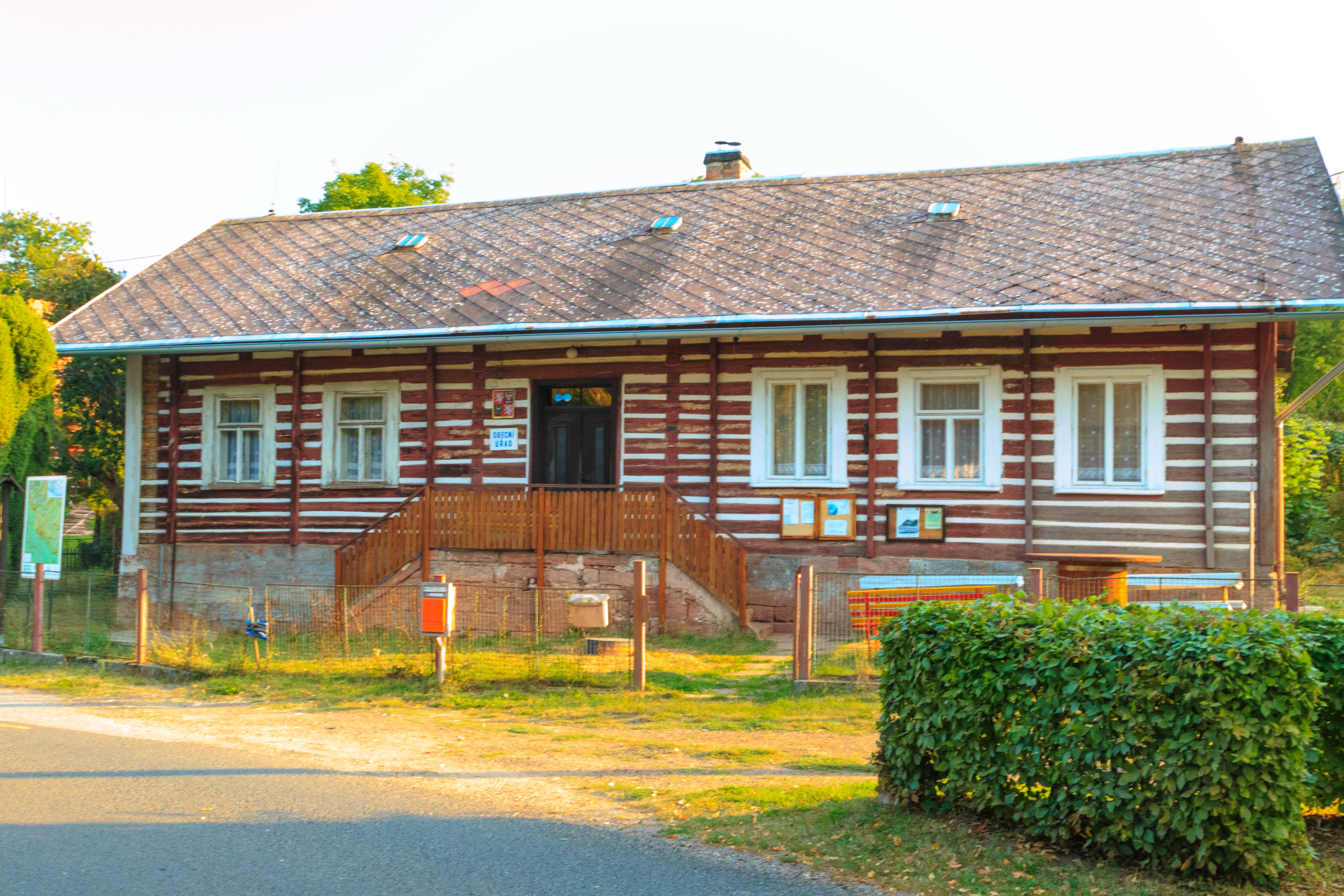 Kyje u Železnice - obecní úřad